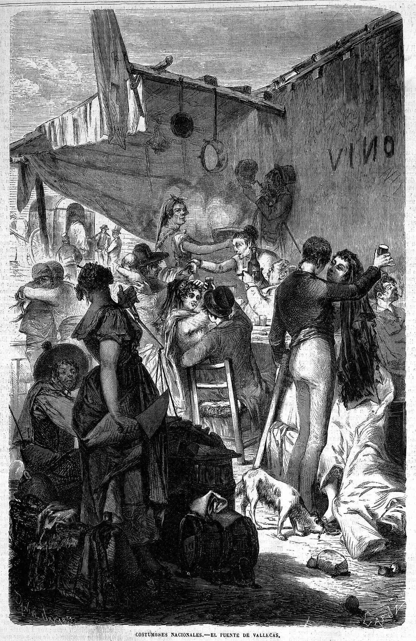 Costumbres nacionales. El Puente de Vallecas.